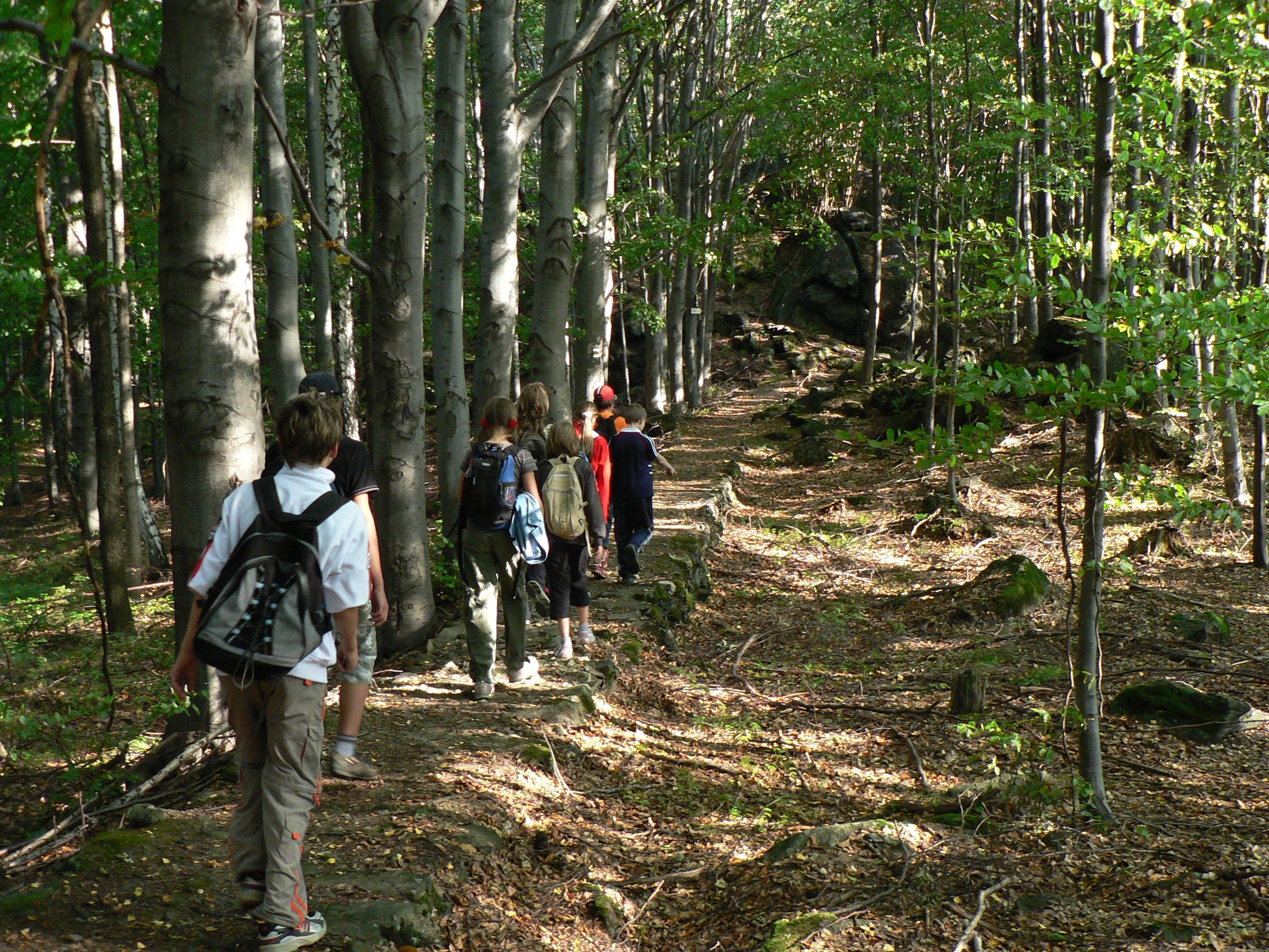 Tzv. Baronská cesta (podle barona Františka Kleina) na temeni Kamenitého kopce nad Sobotínem.